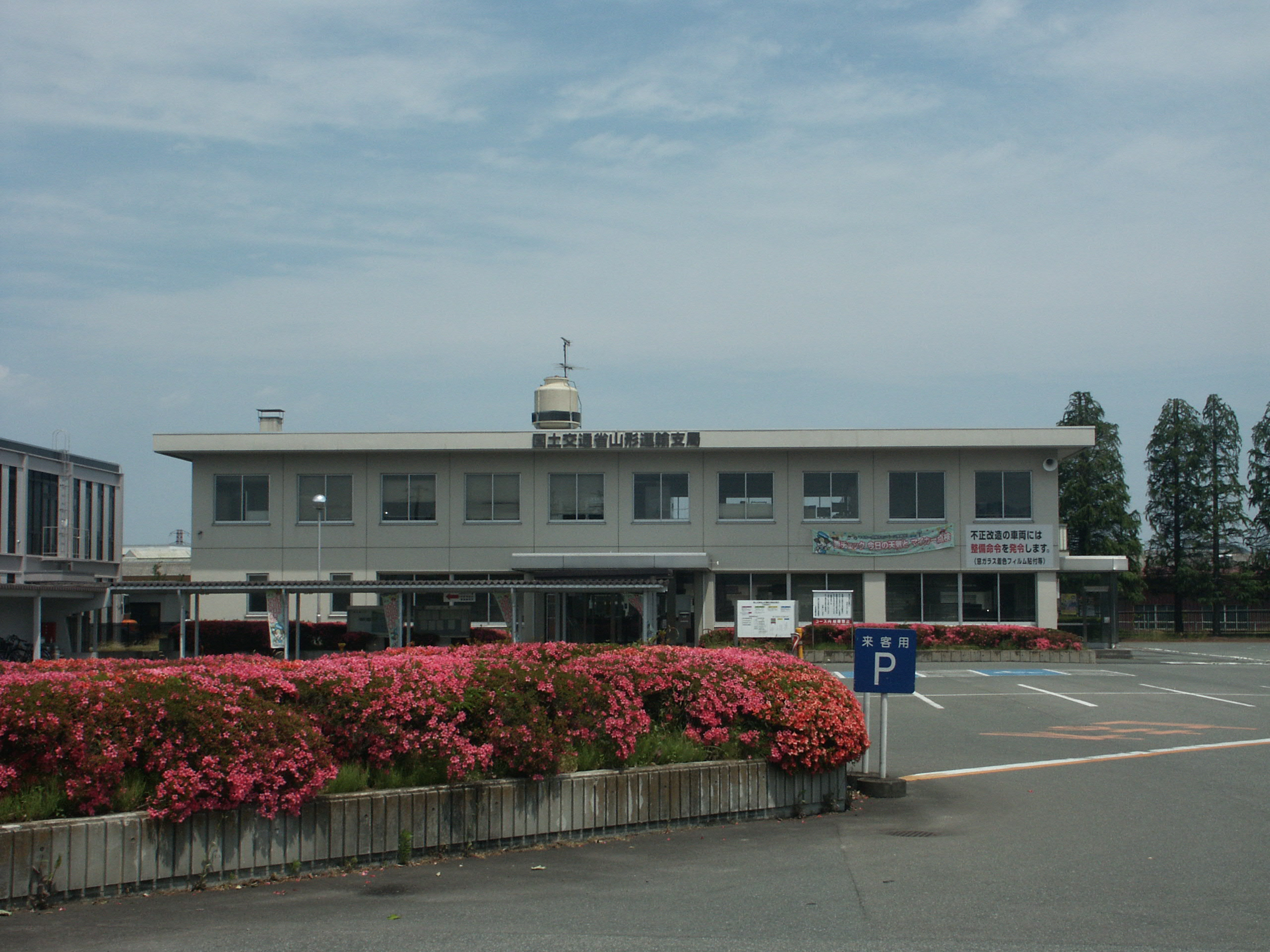 山形運輸支局庁舎